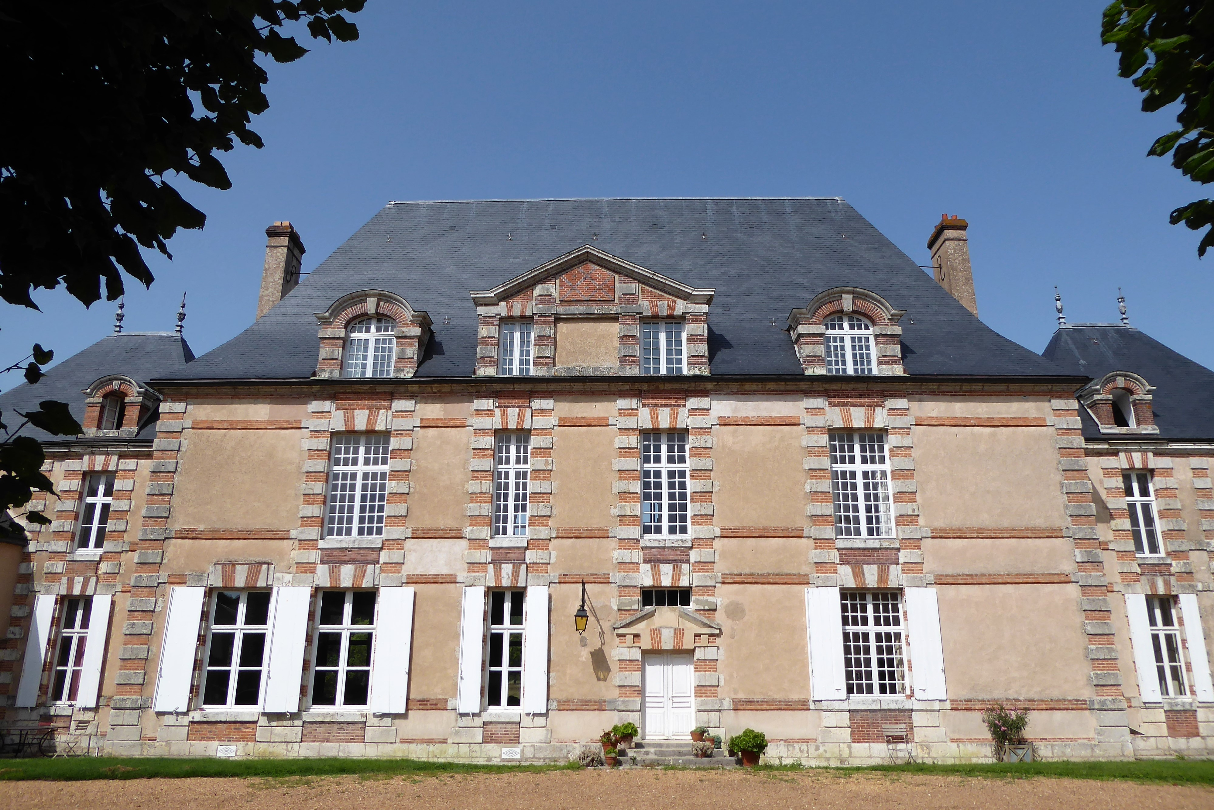 château de Vauventriers, Champhol, Eure-et-Loir (France).